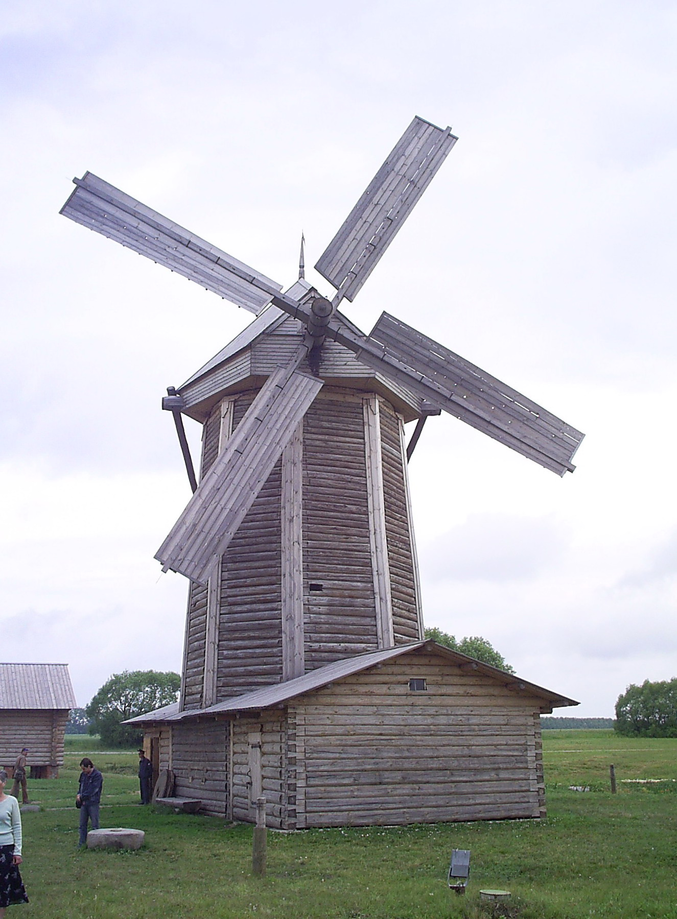 Мельница и дом мельника в Государственном Лермонтовском музее-заповеднике «Тарханы» (Пензенская область, Белинский район).